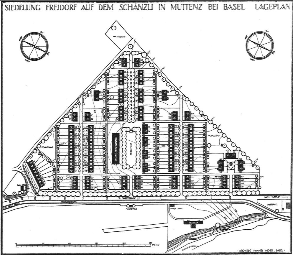 Lageplan Siedlung Freidorf BL, Schweiz